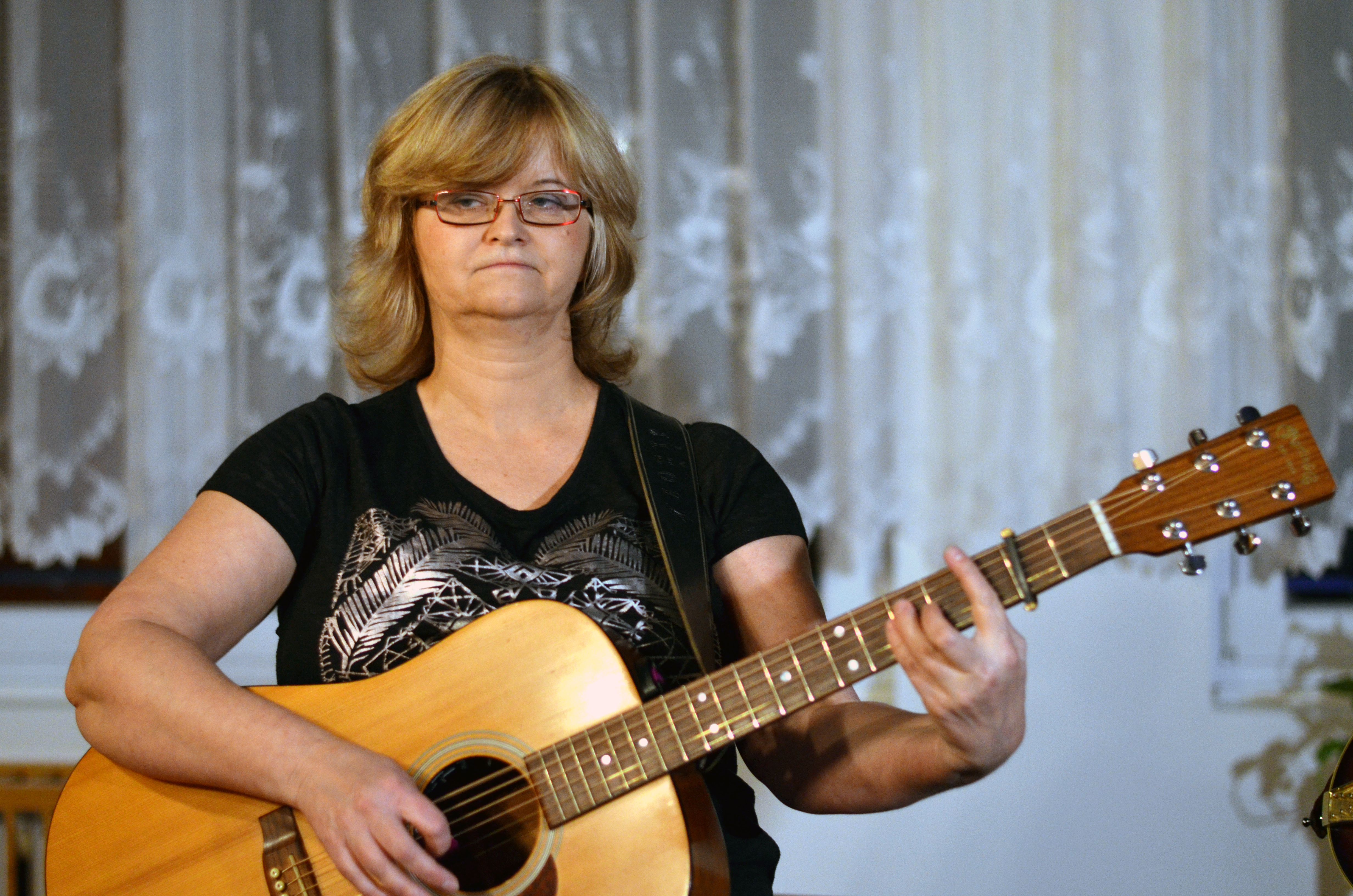 Pavlína Jíšová na koncertě v Adamově